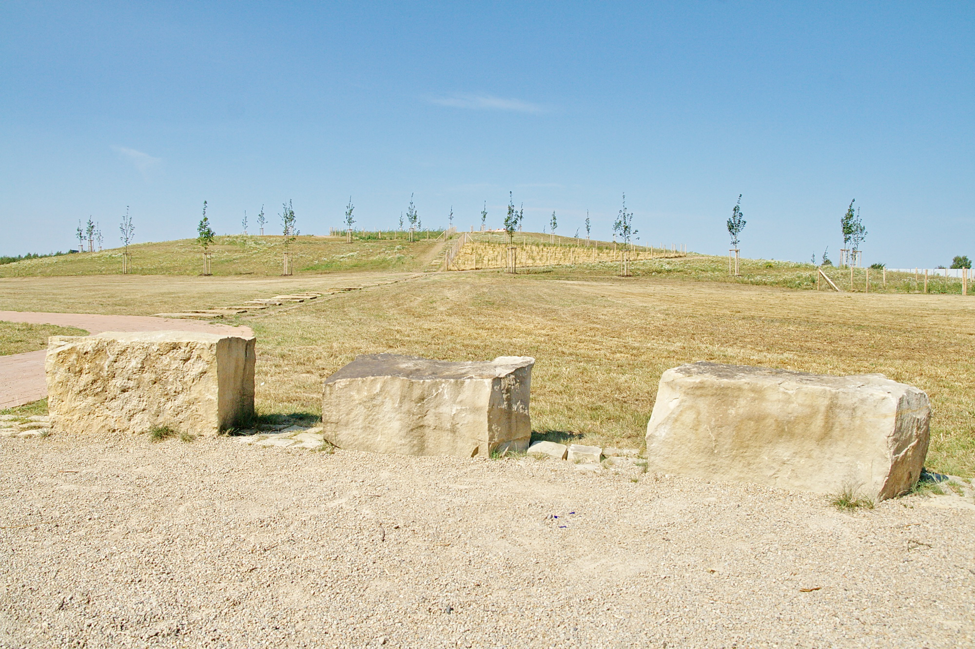 Scherenhorster Berg in Kaltenweide (Langenhagen), Niedersachsen, Deutschland